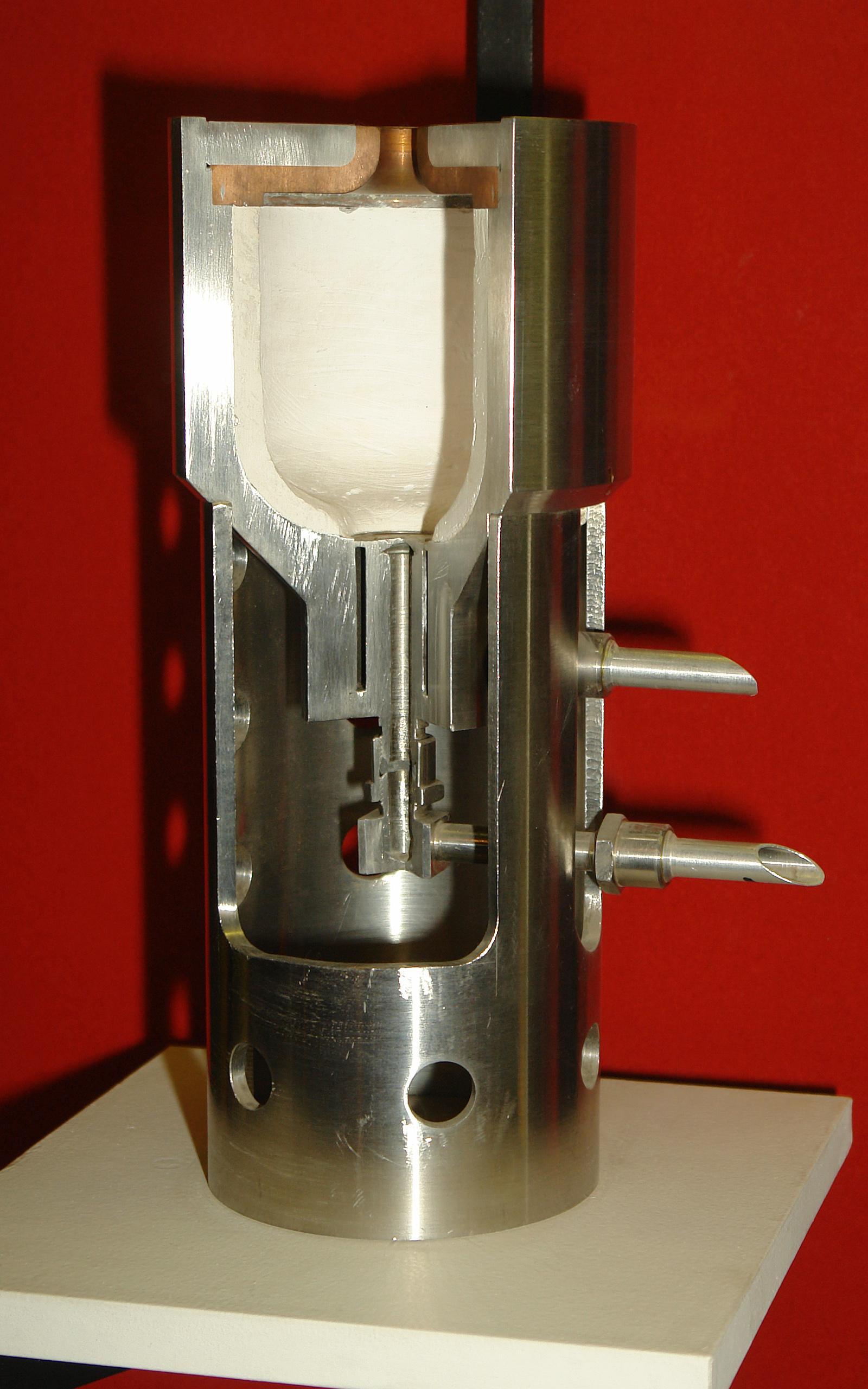 Экспериментальный жидкостный ракетный двигатель ОРМ-9. Музей космонавтики и ракетной техники; Санкт-Петербург. This photograph was taken in Museum of Space and Missile Technology (Saint Petersburg) Object location59° 57′ 07″ N, 30° 19′ 16″ E